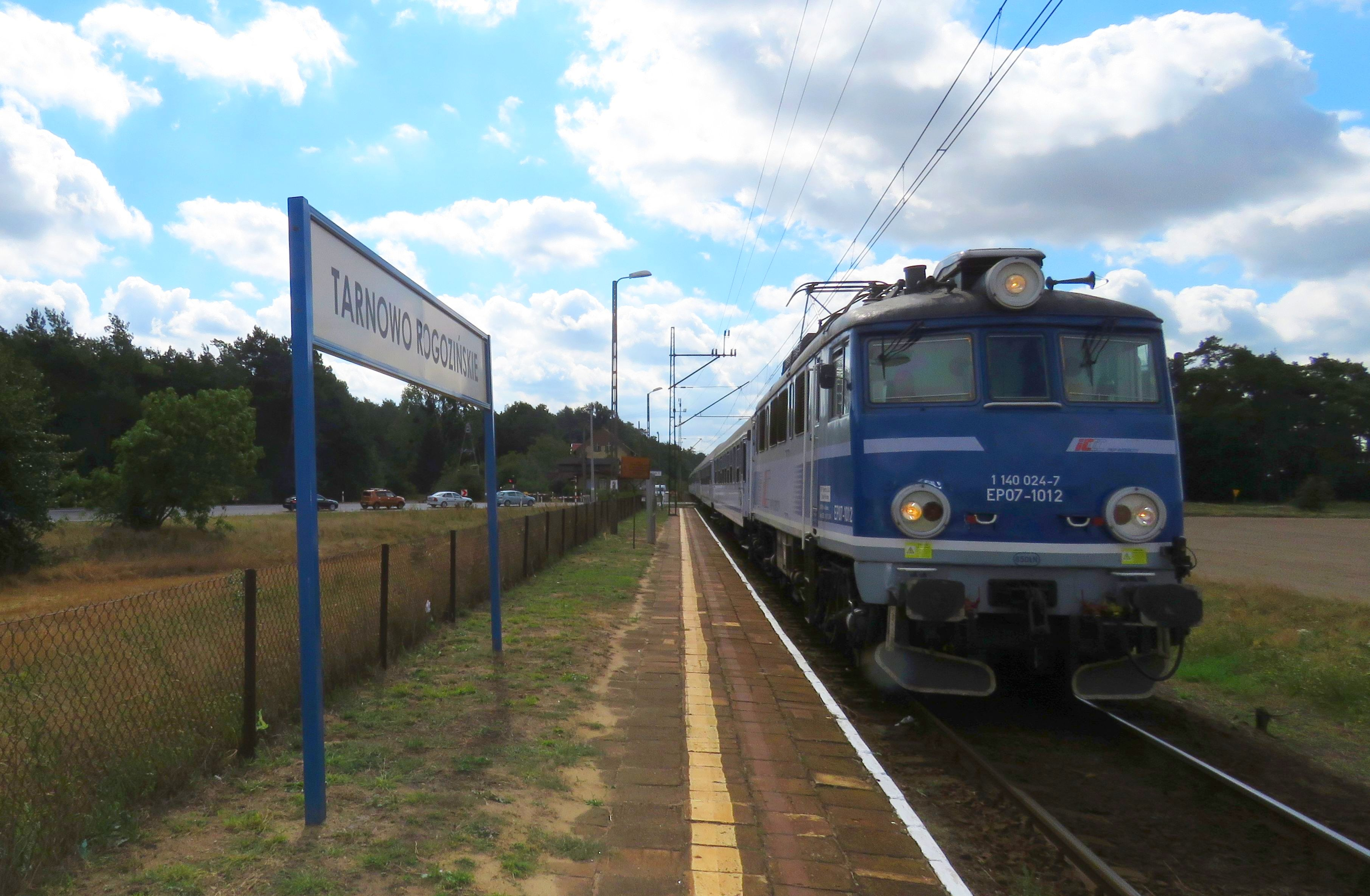 Przystanek kolejowy